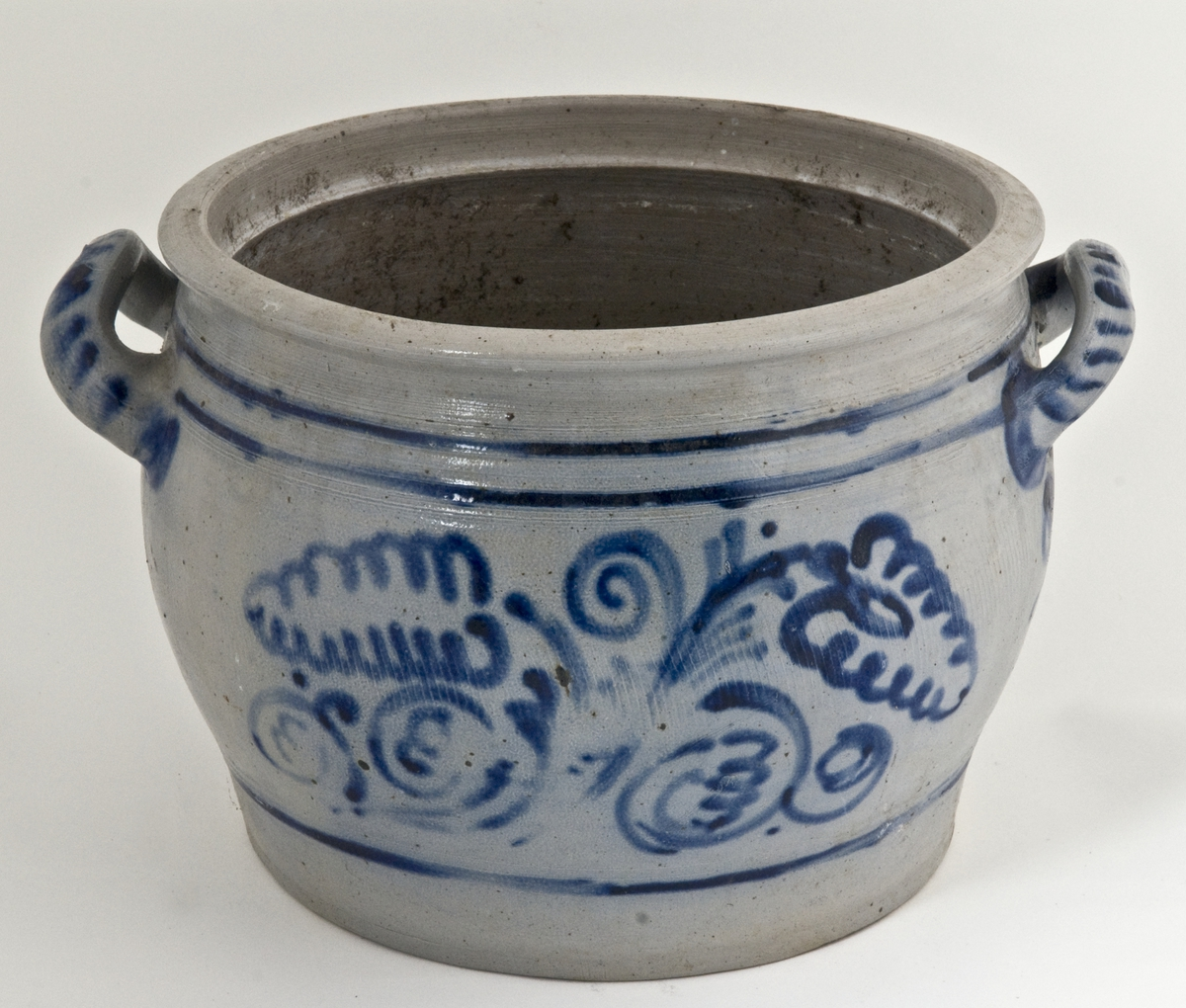 "Hollandsk krukke", syltekrukke i keramikk. Foto Jon-Erik Faksvaag / Norsk Folkemuseum, NF.2010-0222.